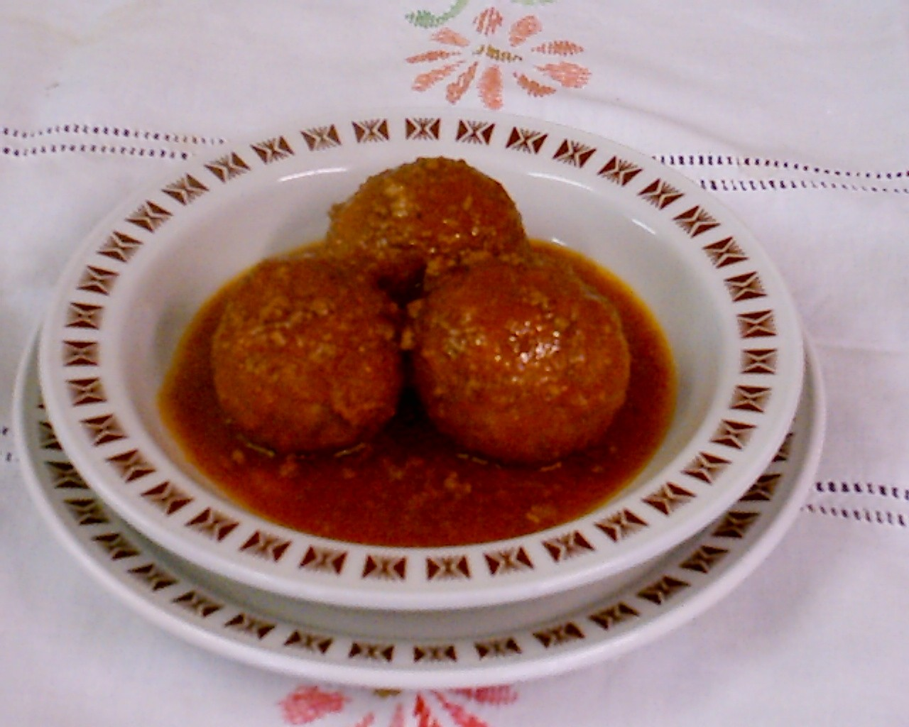 Piatto di tagliatelle fritte